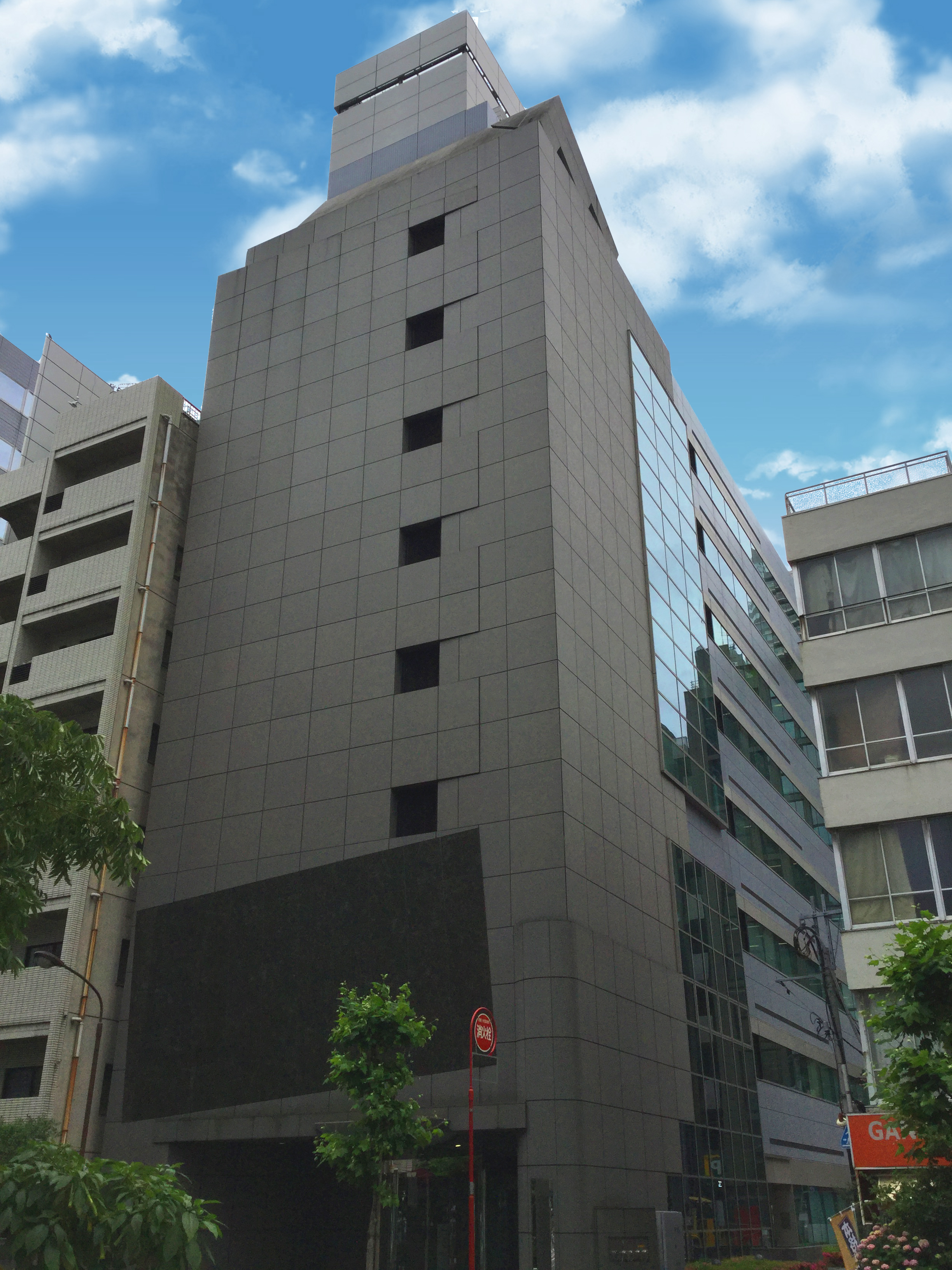 株式会社ザ・ワークス本社